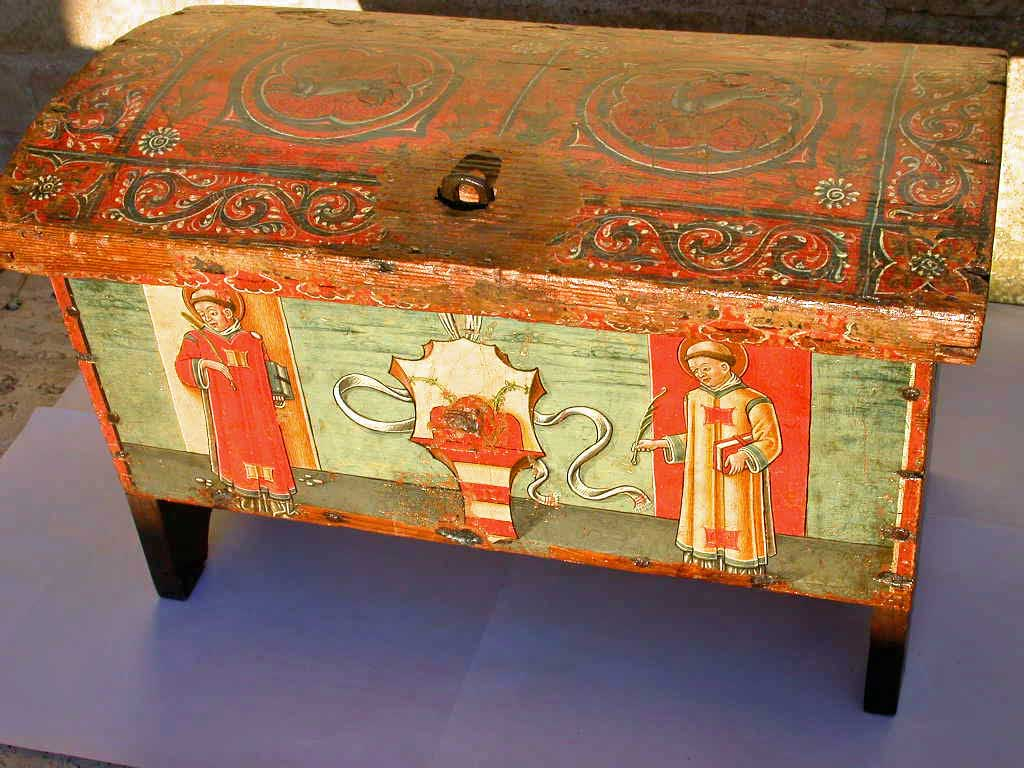 Autore: Paola